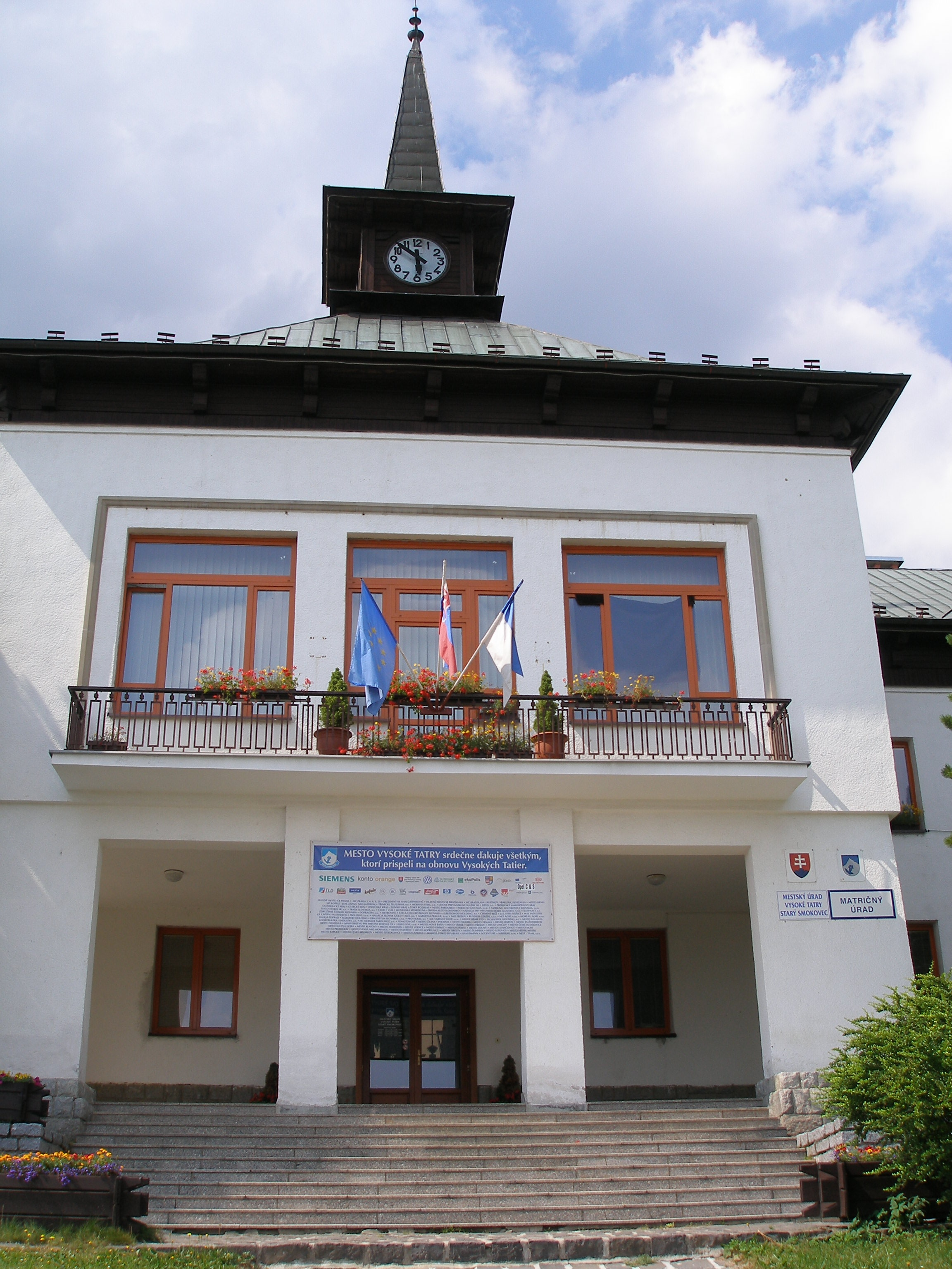 Starý Smokovec, budova mestského úradu